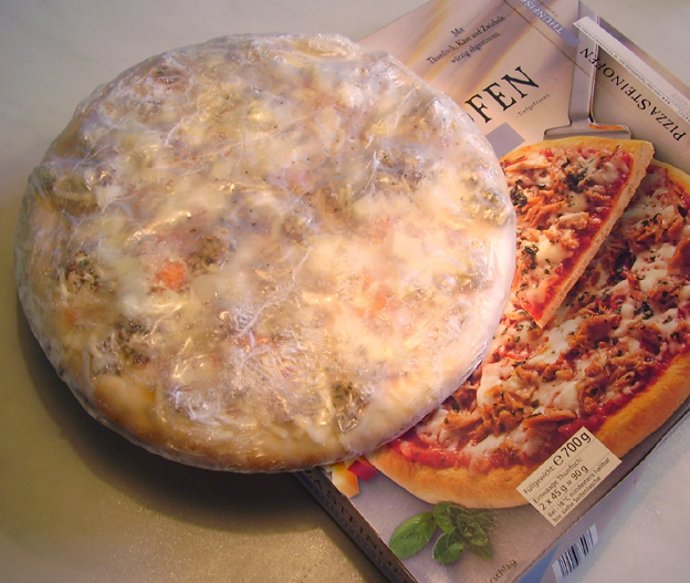 Pizza, Frozen food